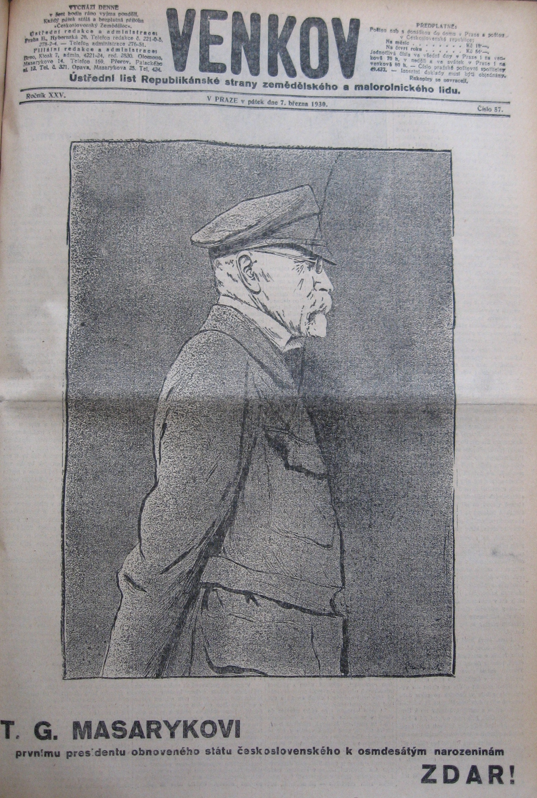 Venkov 7.3. 1930